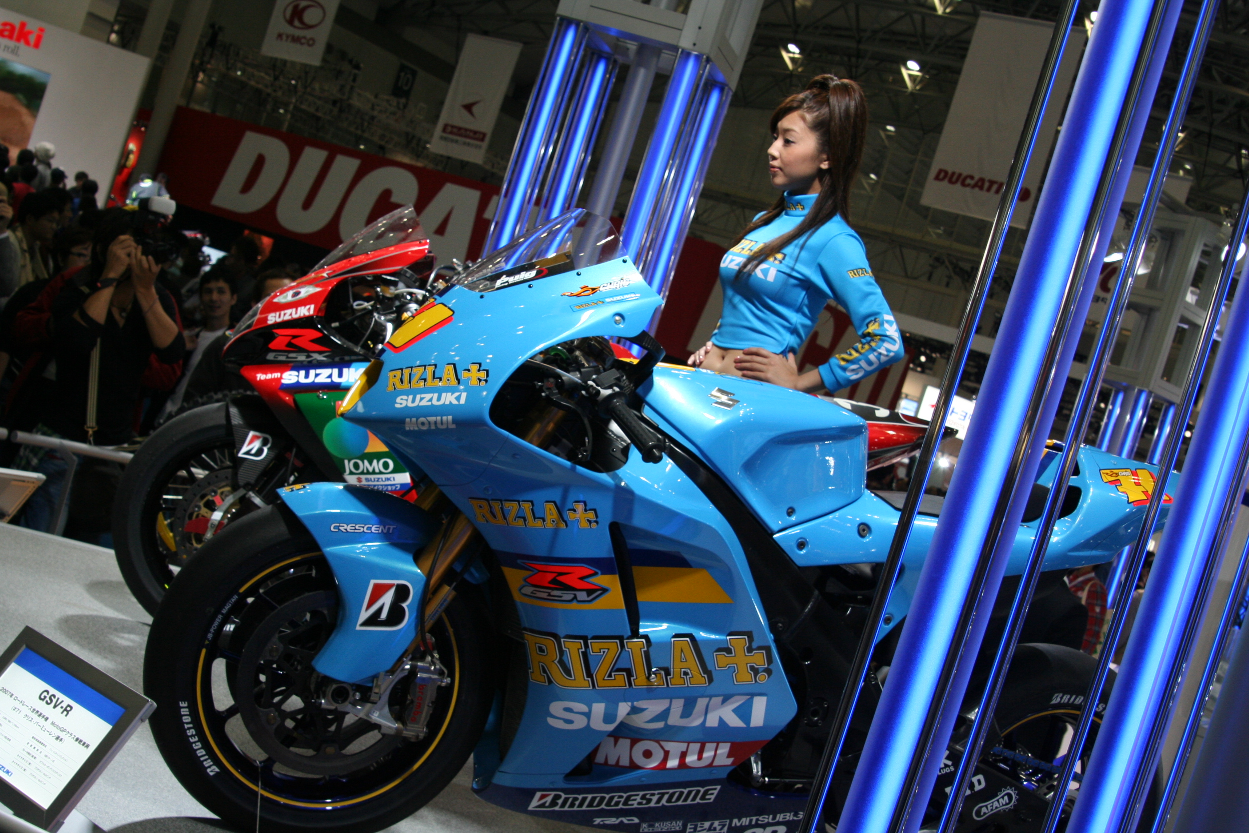 2007 Suzuki GSV-R